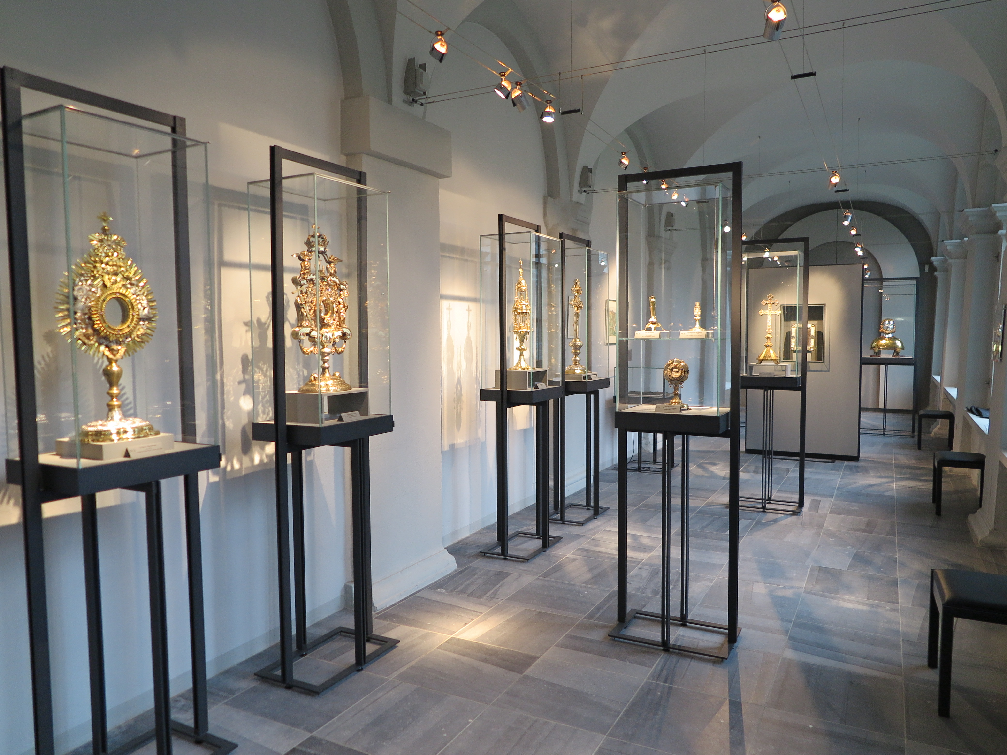 Schatzkammer von St. Johann Baptist in Aachen-Burtscheid.